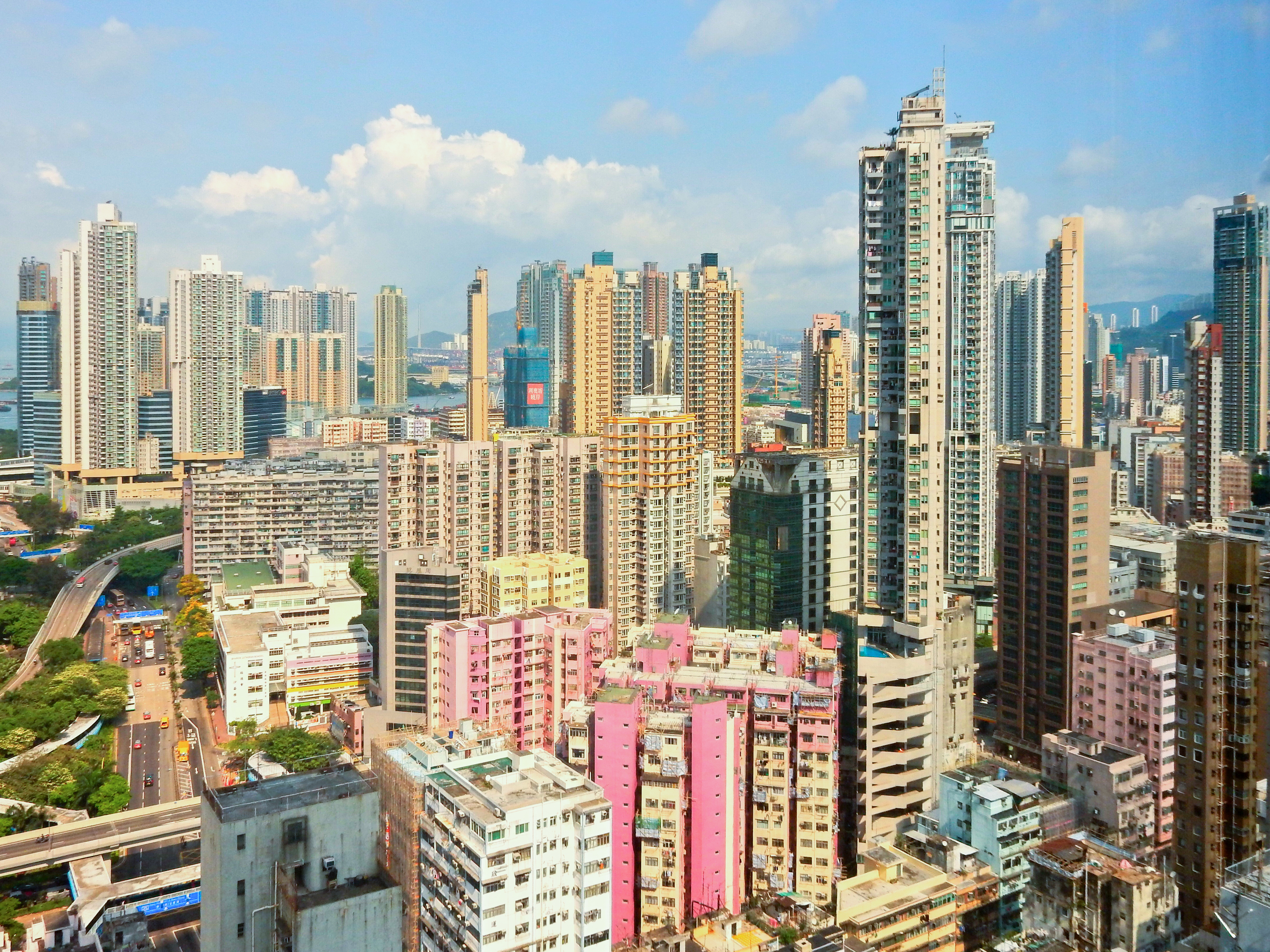 Tai Kok Tsui View From Langham Hotel, Hong Kong